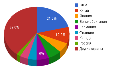 Доля России в общем количестве научных статей в международных научных журналах в период